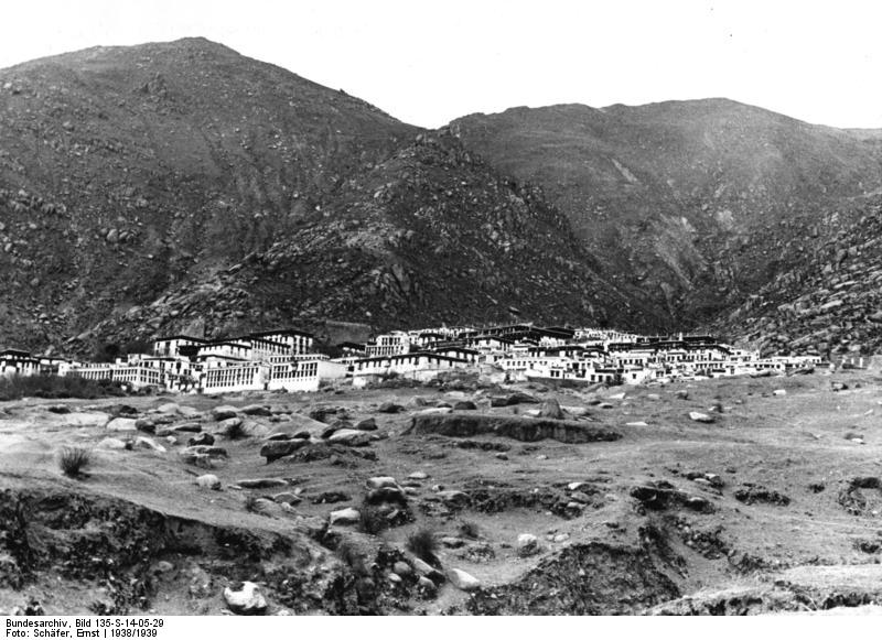 Lhasa, Kloster Drepung